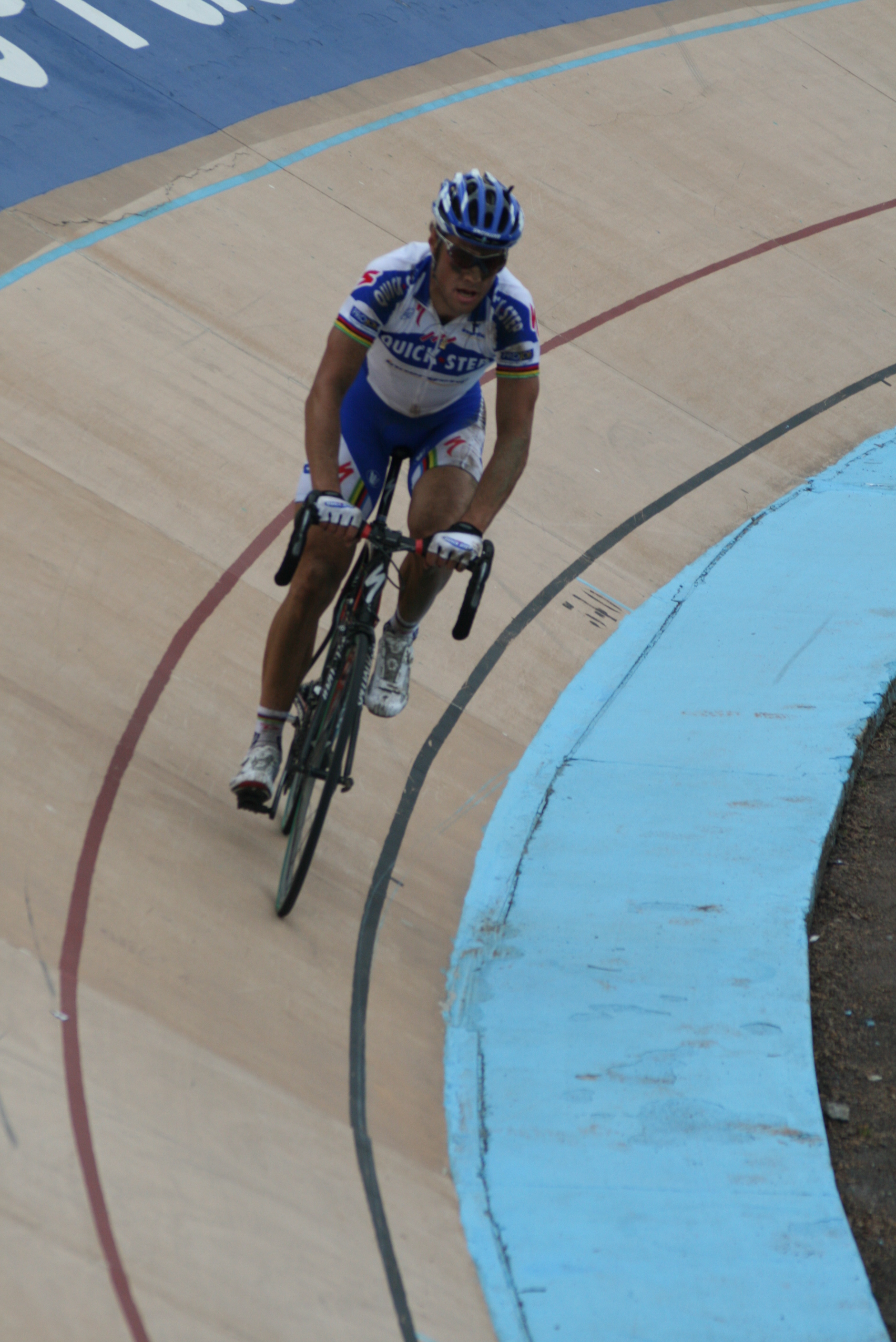 Paris-Roubaix 2009 : Tom Boonen à l'arrivée au vélodrome de Roubaix